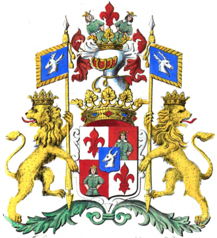 Armes de la famille Descantons de Montblanc